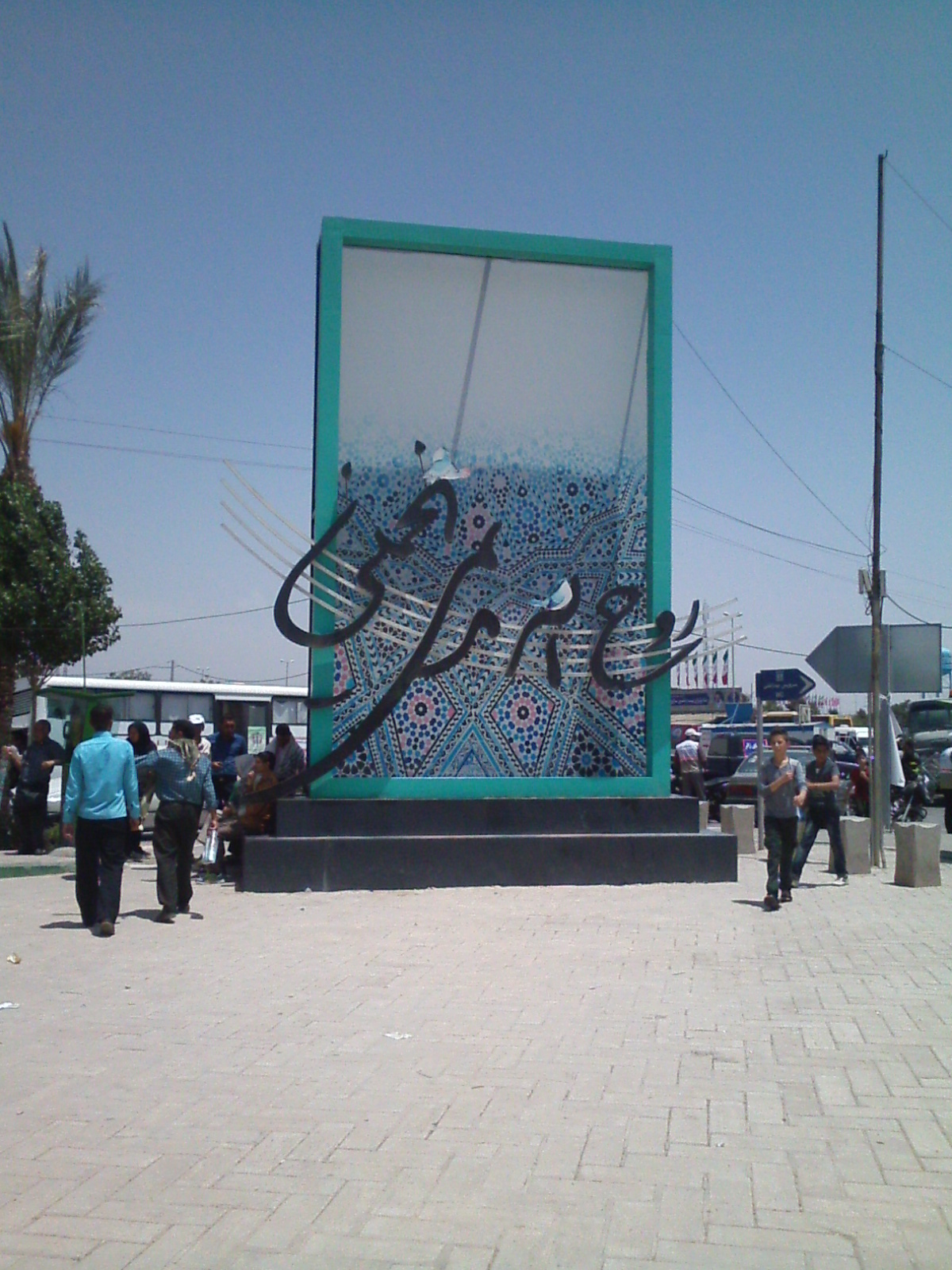 آرامگاه سید روح‌الله خمینی